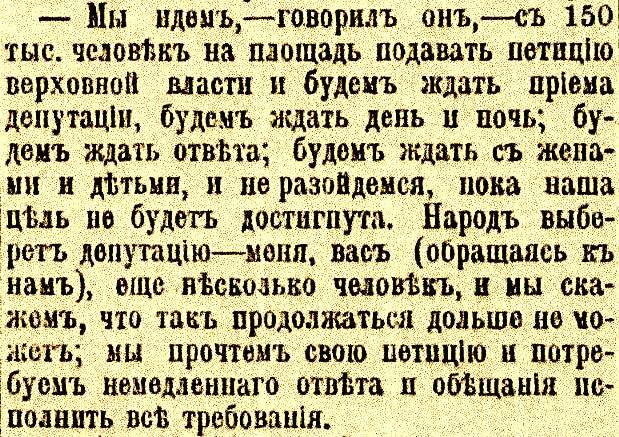 Фрагмент из воспоминаний меньшевика Л. Динина о встрече со священником Гапоном в ночь с 7 на 8 января 1905 года.